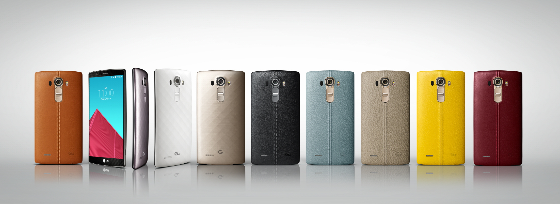 LG전자, ‘LG G4’ 글로벌 런칭 ■ 29일(한국시간 기준), 전세계 6개국 동시 공개행사 진행 □ 29일 한국 출시, 국내 출시가 82만 5천원 □ 전세계 180여개 통신사에 순차 공급, 역대 최다 ■ 아날로그 감성 지닌 名品 천연가죽 소재 적용 □ 3년 이상 연구한 천연가죽 후면커버… 제작기간만 3개월 소요 □ 내구성 강화한 인체공학적 ‘슬림 아크’ 디자인 채택 □ 메탈과 도자기의 실제 느낌 살린 ‘3D 패턴’ 후면 디자인도 선보여 ■ 조리개값 F1.8 렌즈 탑재한 DSLR급 카메라 □ 40% 커진 이미지 센서 적용한 1600만 화소 메인 카메라 □ 전문가모드: 셔터스피드/화이트밸런스/감도 등 수동 조절 □ 국내최초 800만화소 탑재한 강력한 셀피용 전면카메라 □ 손짓만으로 연속 4장 셀피 찍을 수 있는 ‘제스처 인터벌 샷’ □ 세계최초 ‘컬러 스펙트럼 센서’ 적용, 보다 정확한 색 표현 □ 성능 2배 개선한 ‘OIS(손떨림 방지) 2.0’ 탑재 ■ 자연색감 그대로의 5.5인치 ‘IPS 퀀텀 QHD 디스플레이’ 화질 □ G3 대비 색재현력 20%, 명암비 50%, 휘도 25% 개선 □ 디지털 시네마 색 표준(DCI-P3) 98% 부합, 영화 같은 화질 구현 □ 1,100만개 이상 서브픽셀로 정확한 색표현 □ 소모 전류 절감으로 배터리 효율 20% 높여 ■ 인간 중심의 UX 4.0 □ 퀵샷: 꺼진 화면에서 더블클릭만으로 카메라 실행과 동시에 촬영 □ 갤러리: 촬영시간과 장소에 따라 사진을 자동으로 정렬 □ 퀵헬프: 검색 한번으로 G4 사용법 안내 ※ Social LG전자 ( 에서 관련 보도자료를 확인하실 수 있습니다.